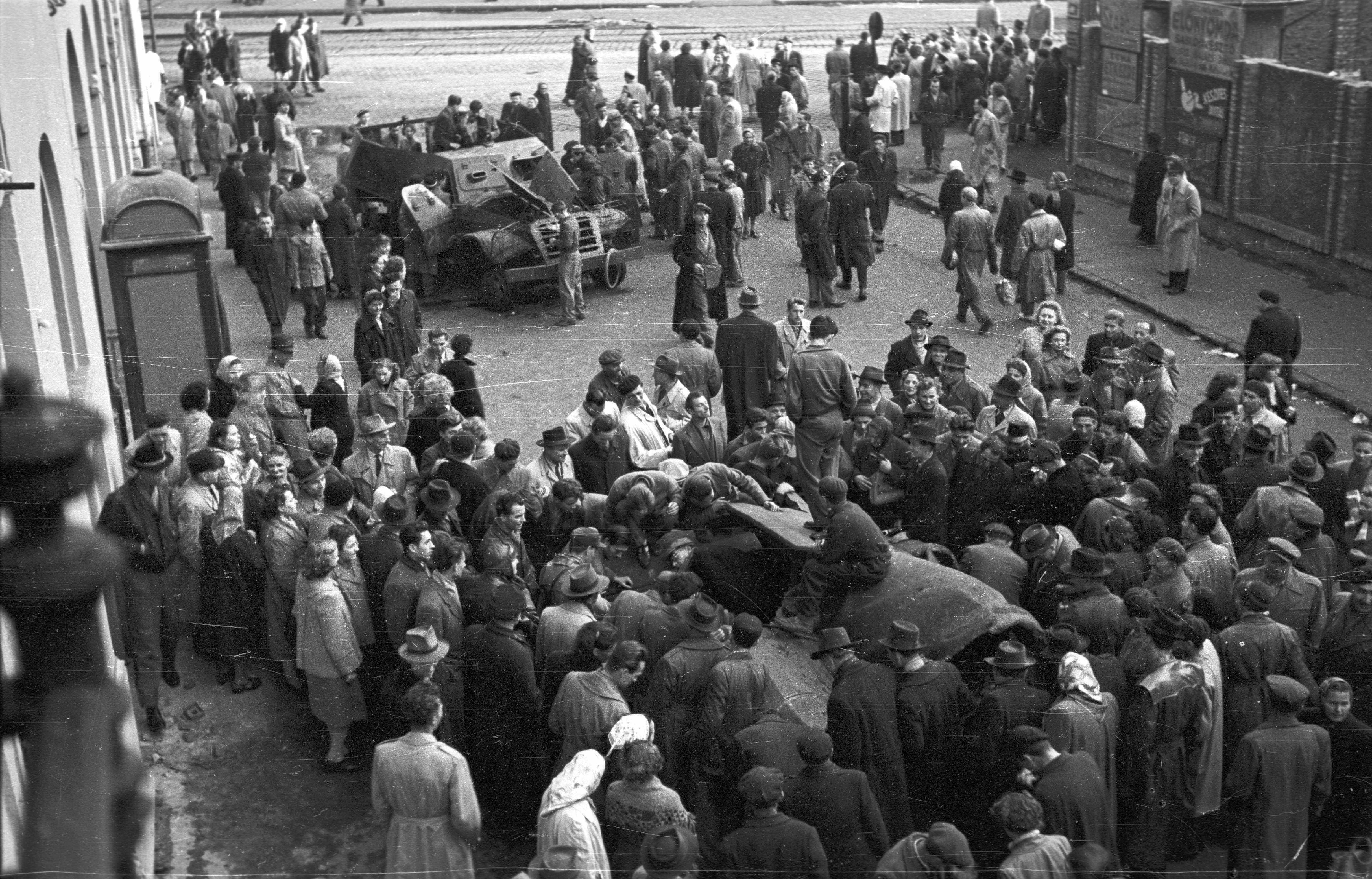 Akácfa utca Rákóczi út felé nézve, folyik a Sztálin szobor szétdarabolása. Location: Hungary, Budapest VII. Tags: wreck, revolution, mass, armoured car, destruction of symbols, combat vehicle, street view, sculpture, Soviet brand, Budapest Title: Akácfa utca Rákóczi út felé nézve, folyik a Sztálin szobor szétdarabolása.